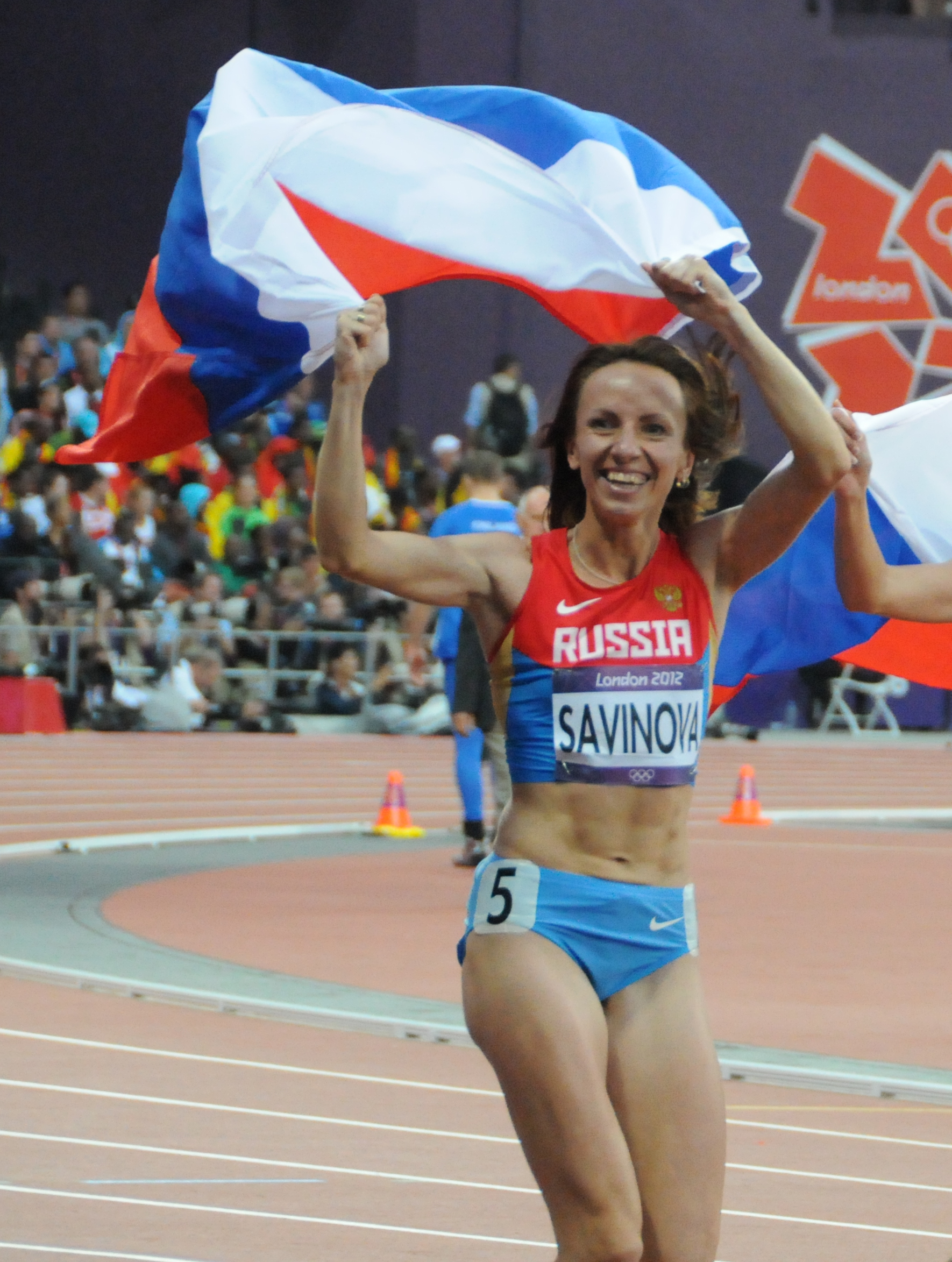 La médaille d'or et de bronze du 800m: Mariya Savinova et Ekaterina Poistogova